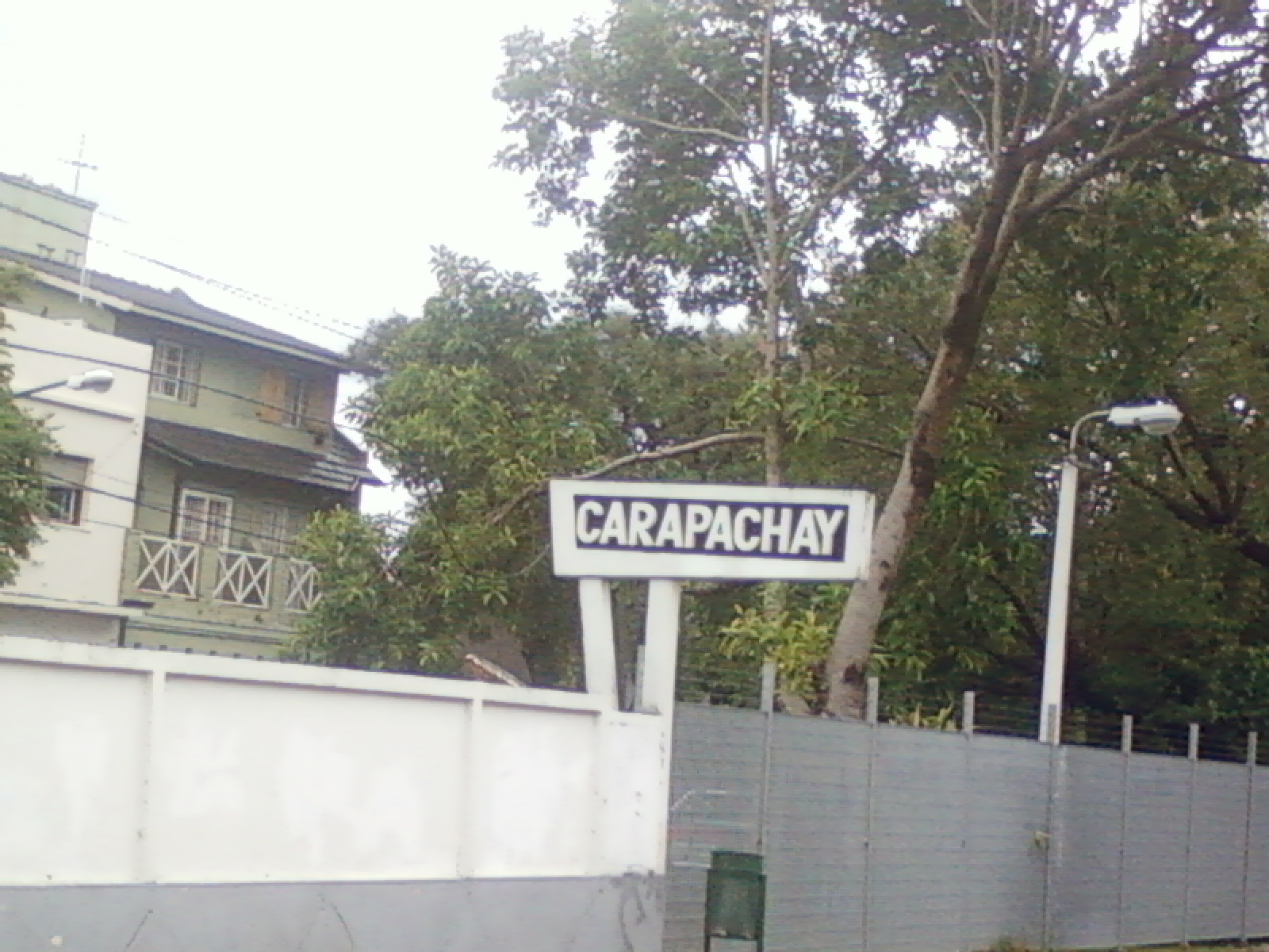 Nomenclador Estacion Carapachay